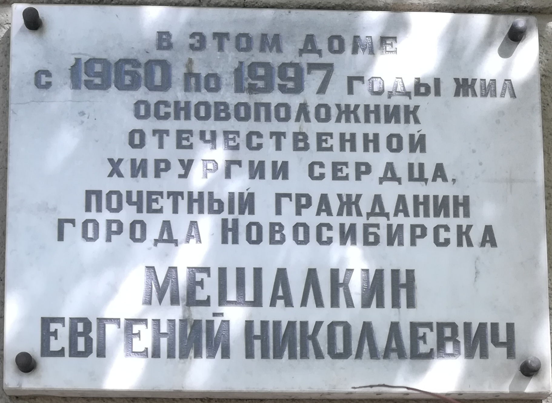 Мемориальная доска